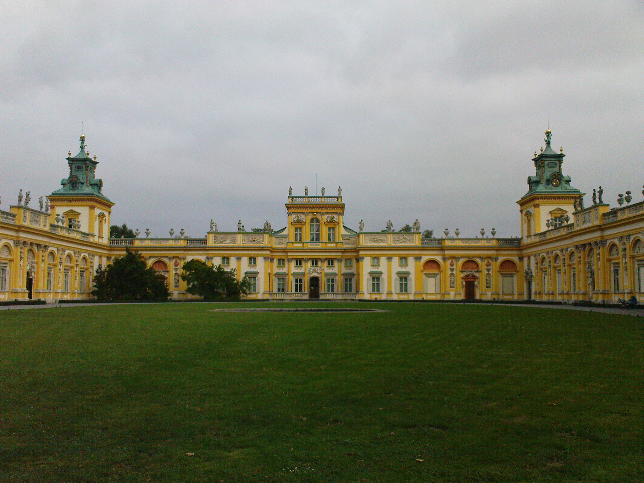 Pałac Królewski - widziany z dziedzińca głównego